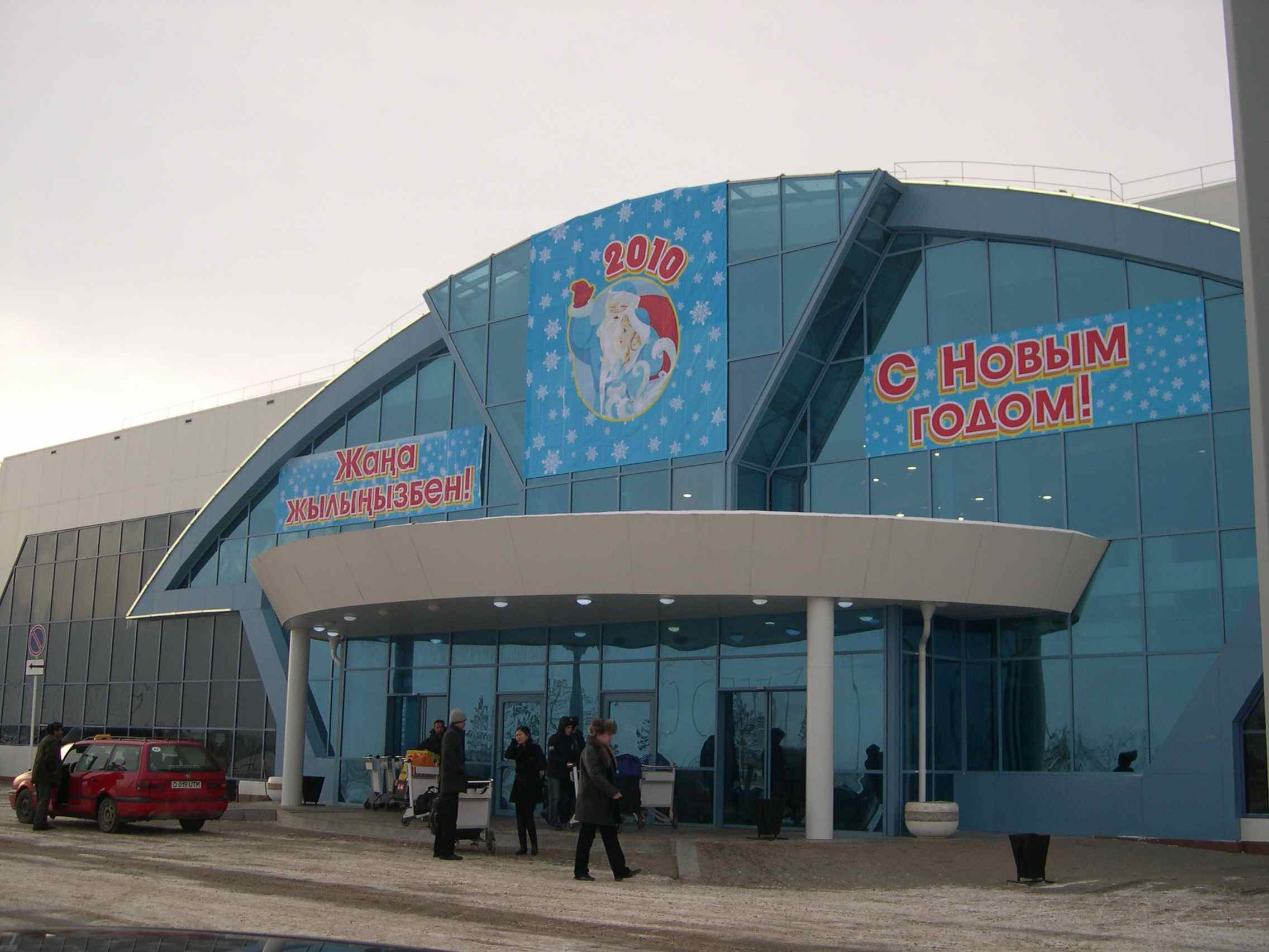 Aktobe airport entrance in december 2009.